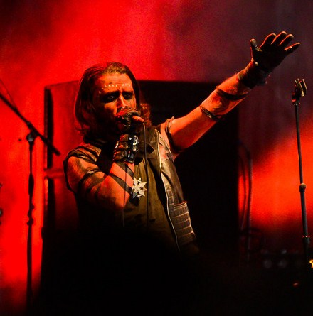 Kvohst, vocalista de Dødheimsgard, actuando en el Hellfest de 2011.